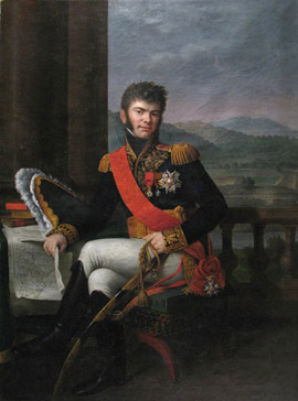 Le général de division baron Jacques-Antoine-Adrien Delort. Commandant en chef la cavalerie du corps du maréchal Suchet en Espagne, il s'illustre par ses coups d'éclats à Sagonte, Castalla et Ordal. Lors de la campagne de Belgique en 1815, il est à la tête d'une division de cuirassiers avec laquelle il charge à Ligny et Waterloo.